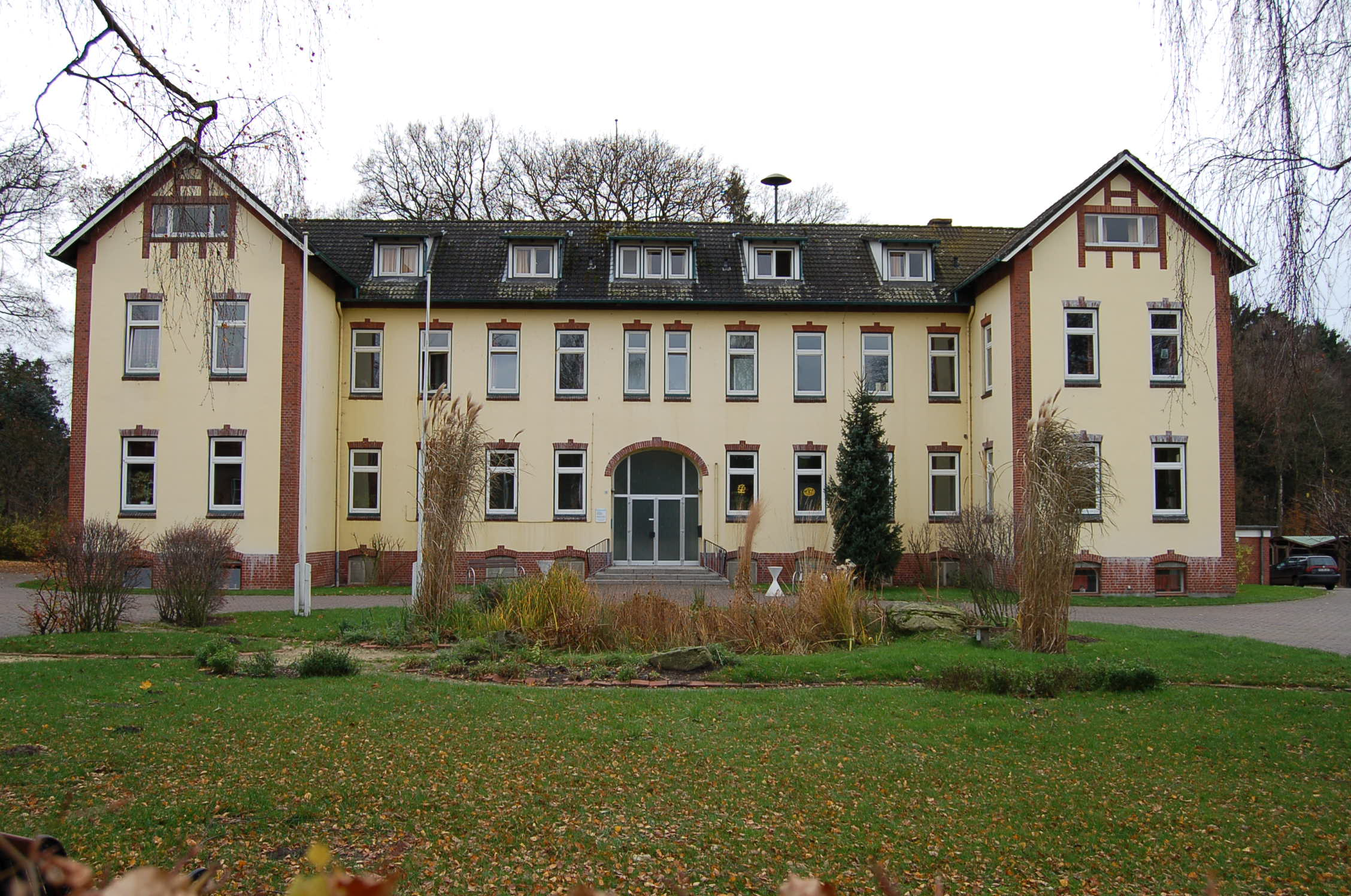 Hamburger Arbeiter-Kolonie in Appen (Kr. Pinneberg)